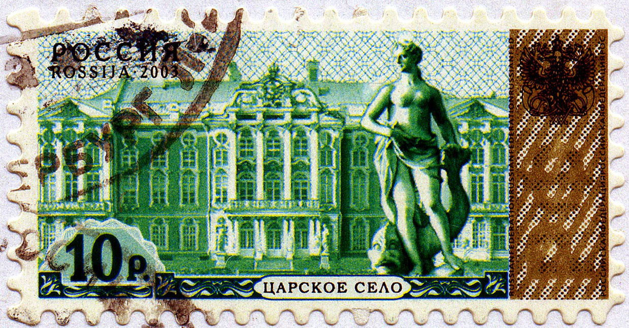 Почтовая марка России. 2003. Царское село